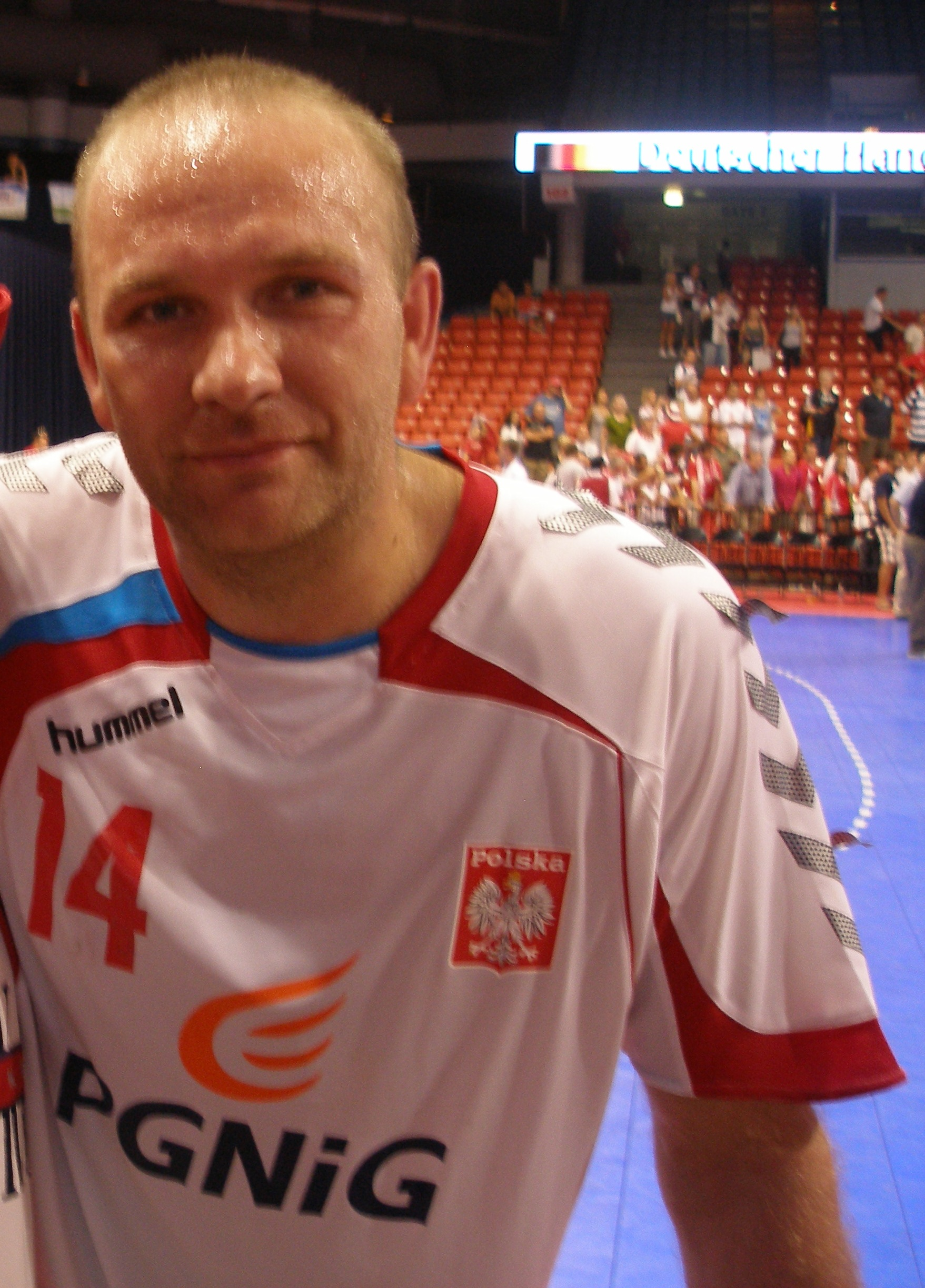 Skrzydłowy szczypiornista polskiej reprezentacji w piłkę ręczną mężczyzn po meczu Polska-Niemcy w Chicago.